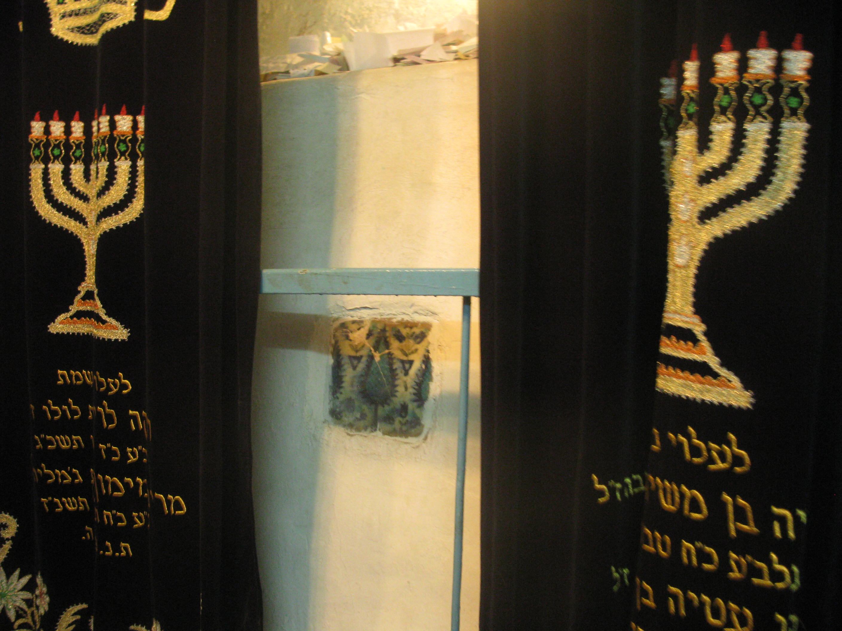 קברו בצפת.